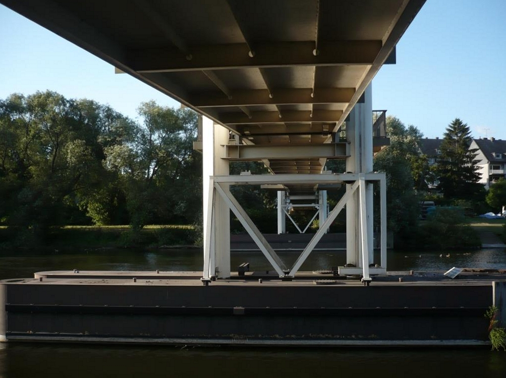 Schwimmbrücke Holtey in Essen-Horst, Ruhr